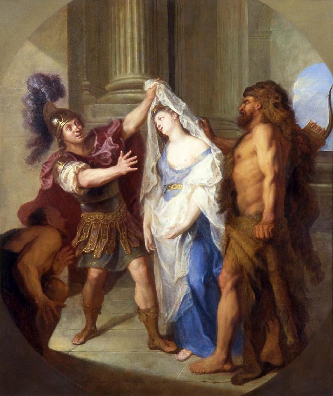 Hercule ramenant Alceste des Enfers, Antoine Coypel, musée d'art et d'histoire de Cholet.